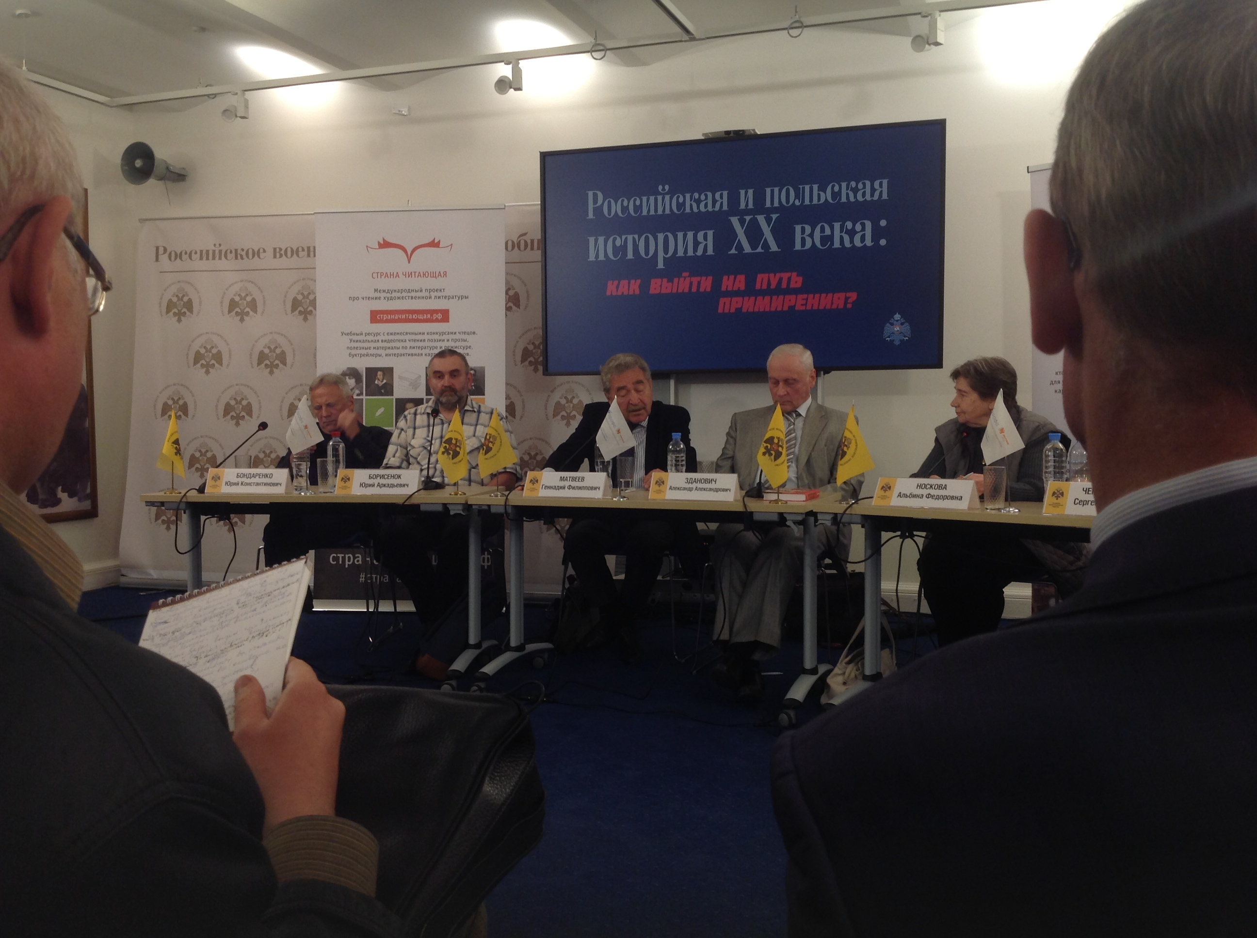 Заседание дискуссионного клуба Российского военно-исторического общества (РВИО), посвящённое проблемам российско- и советско-польских отношений